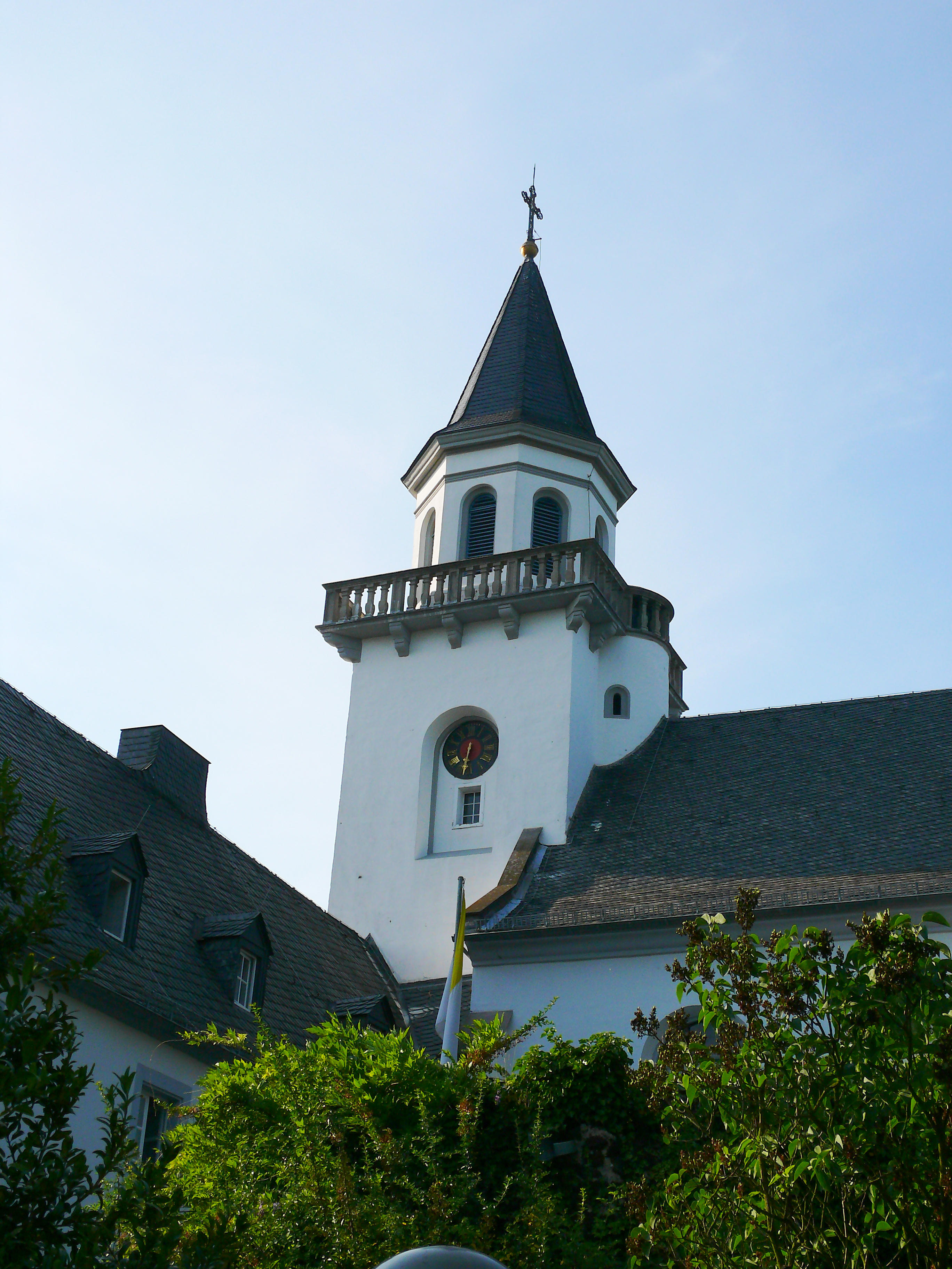 Der Glockenturm der Kreuzbergkirche in Bonn